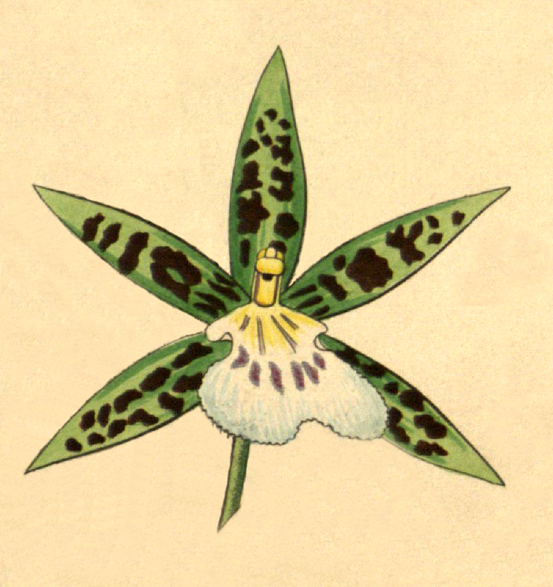 Illustration of Aspasia lunata